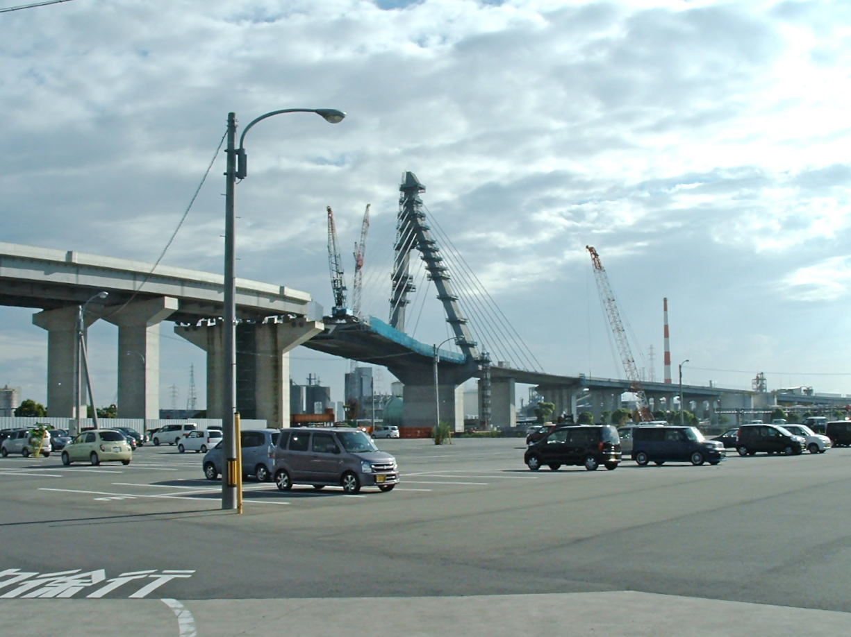 宇部湾岸線の栄川大橋（仮称）。2010年7月18日撮影。